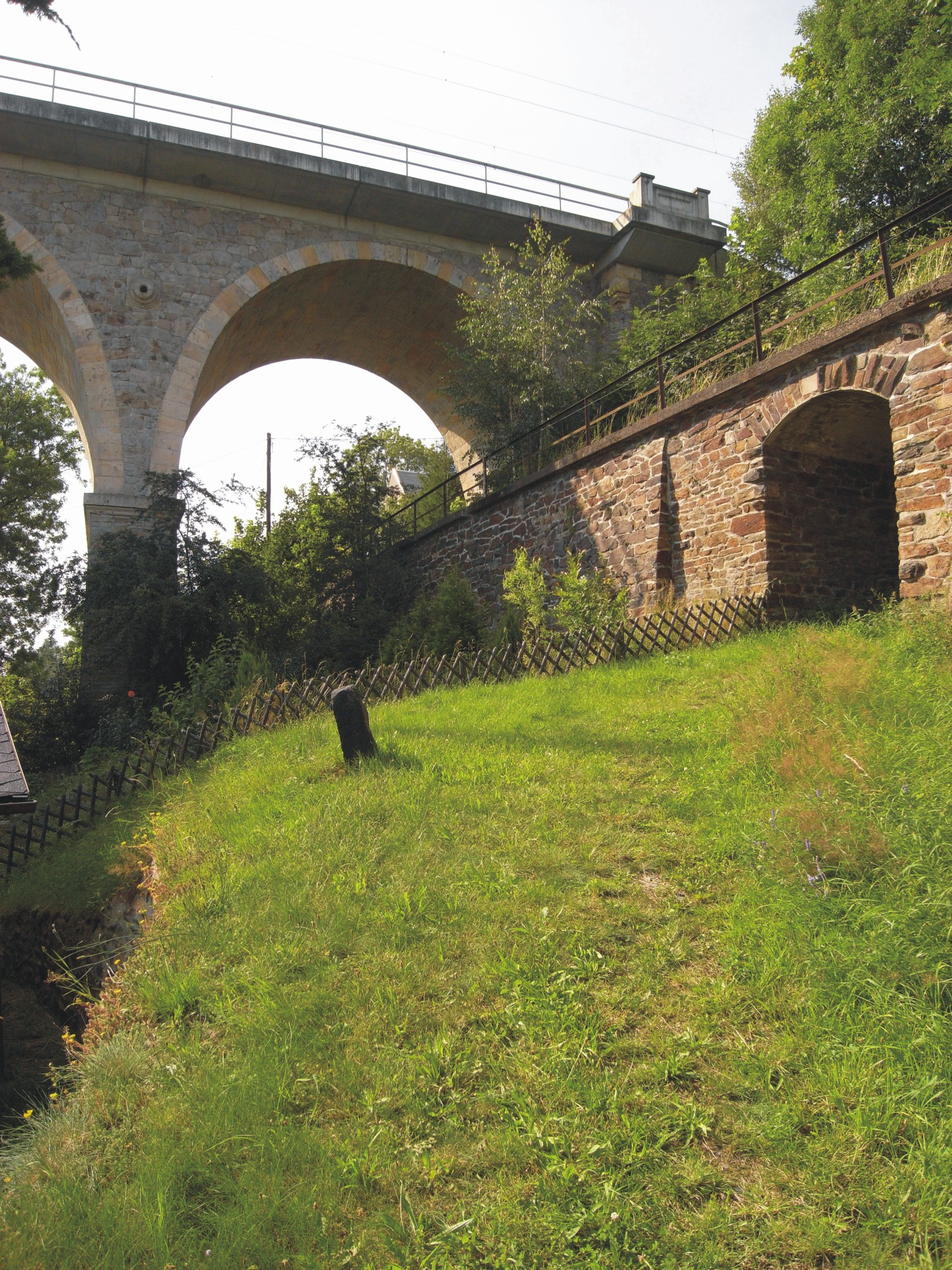 Colmnitz, Viadukt der Bahnstrecke Dresden–Werdau und Bahndamm der ehemaligen Schmalspurbahnstrecke Klingenberg-Colmnitz–Oberdittmannsdorf (Deutschland, Sachsen)